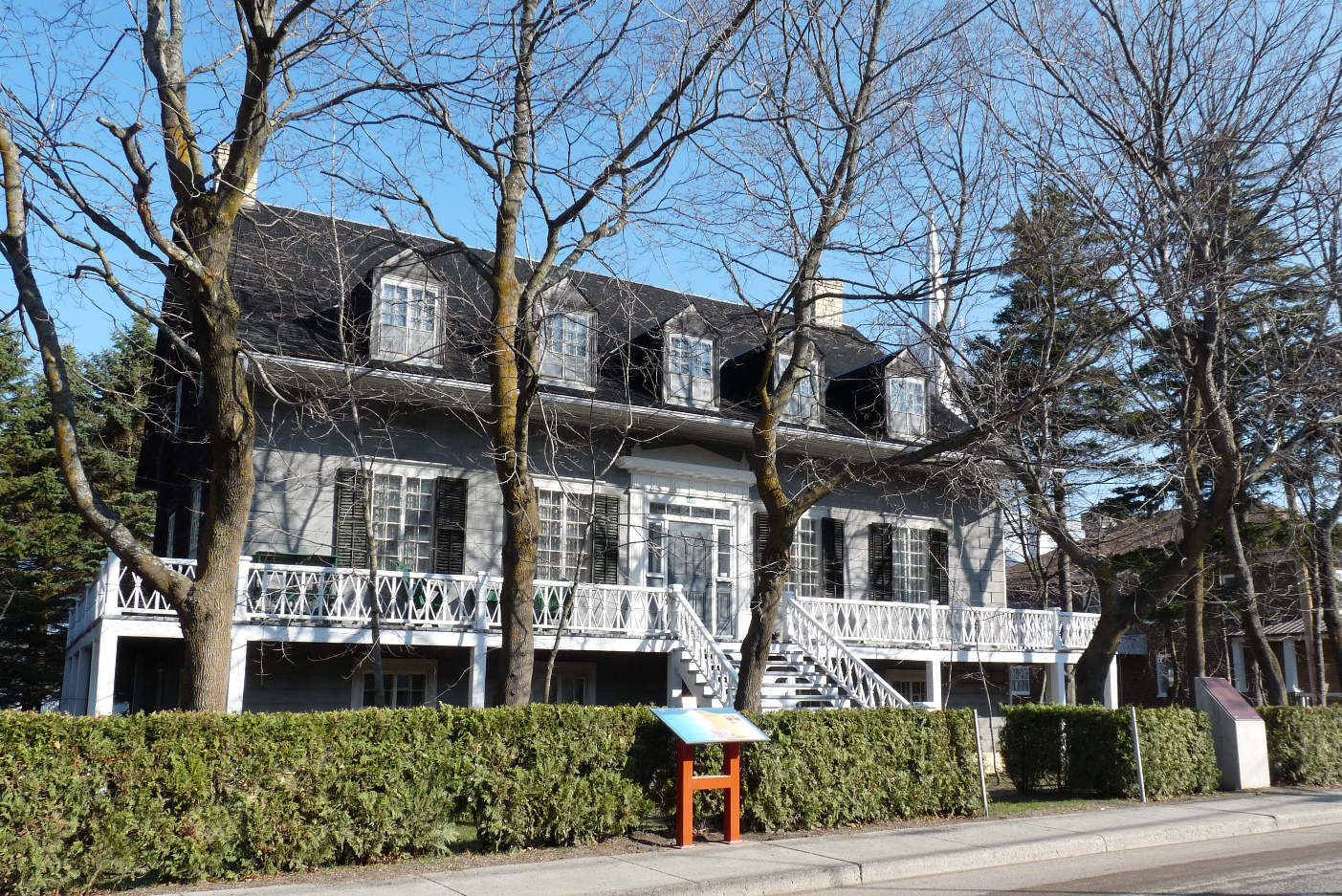 Maison Louis-Bertrand dans le village de L'Isle-Verte, dans le Bas-Saint-Laurent (Québec); désigné lieu historique national du Canada en 1999